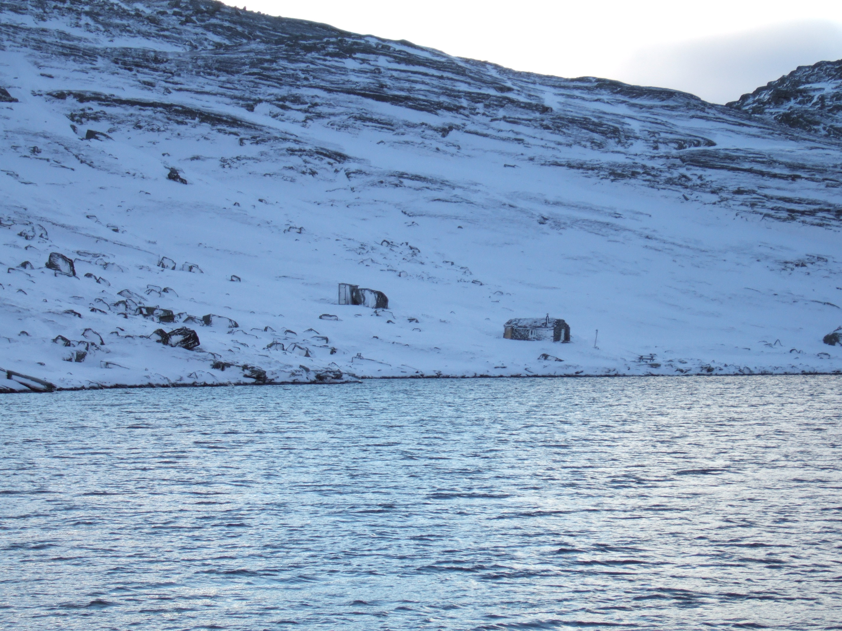 Loennechenbua tidlig morgen, Dovrefjell.